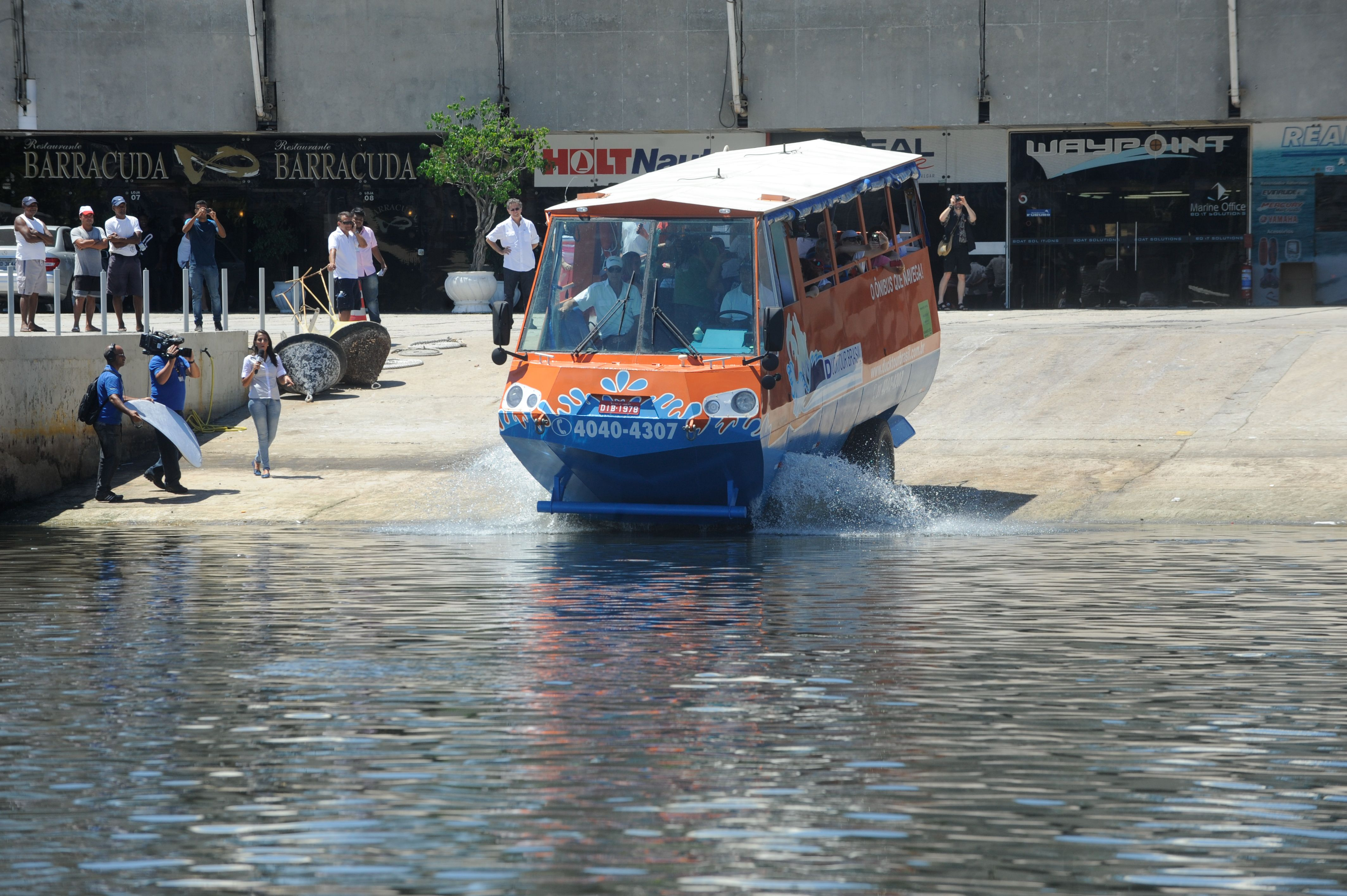 Rio de Janeiro - Chamado de Duck Copacabana, o primeiro veículo anfíbio da frota da Duck Tour Brasil começa a receber passageiros no Rio (Tânia Rêgo/Agência Brasil)